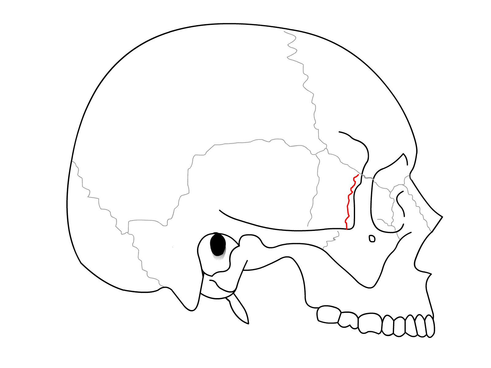 Schädel seitlich - Sutura